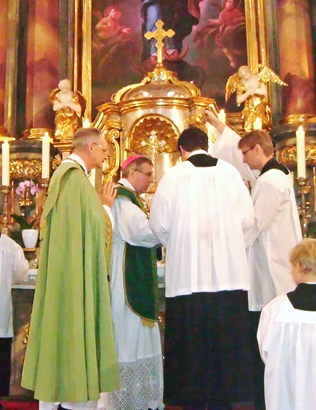 Bischof Czeslaw Konzon von Kopenhagen bei der Feier einer tridentinischen Messe in Neustadt an der Weinstraße